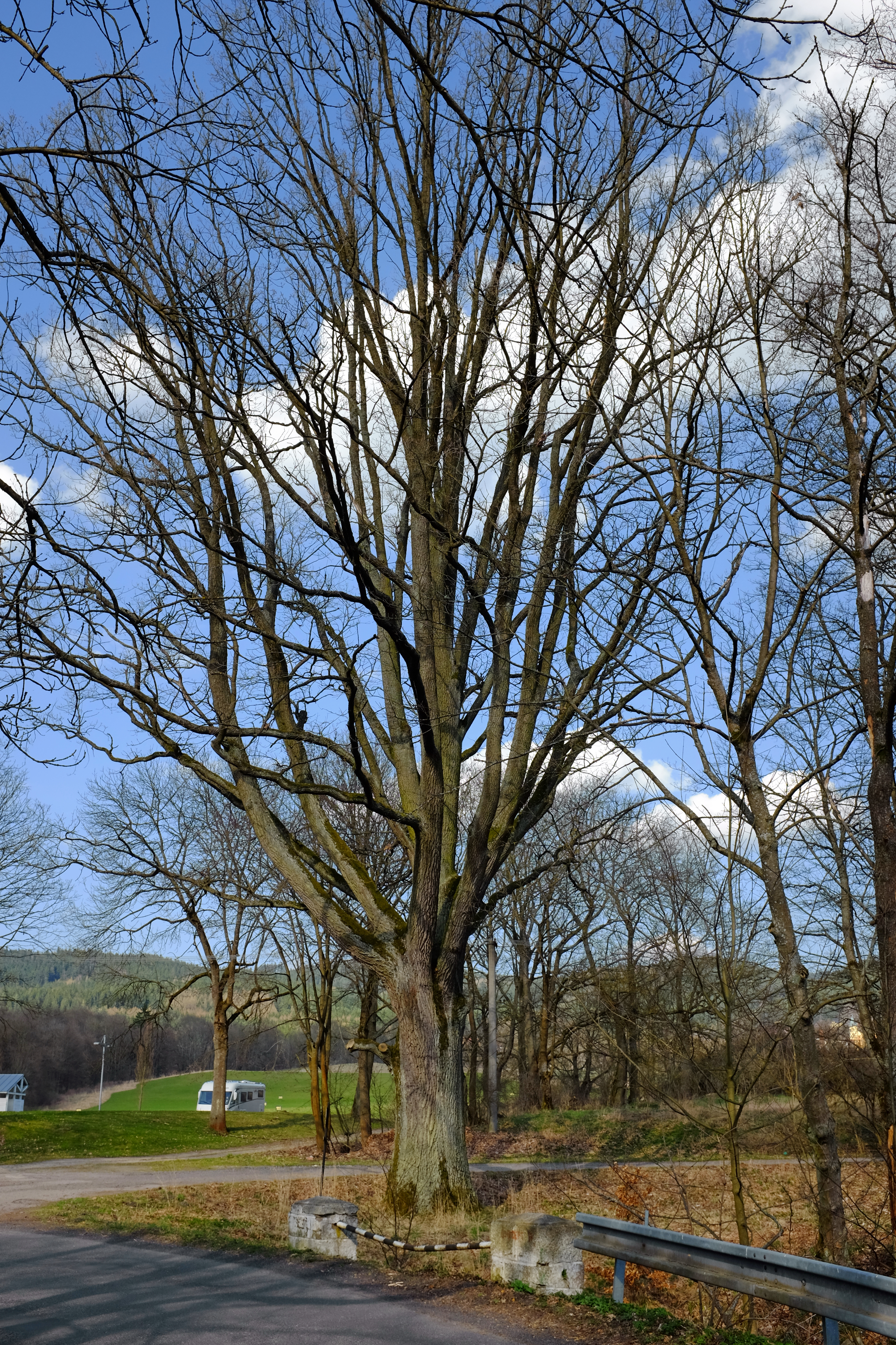 Památný strom - Dub u zámeckého statku, Lázně Kynžvart